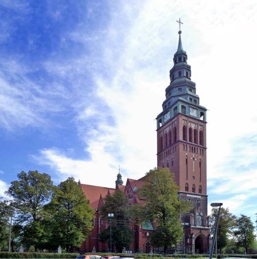 Kościół parafialny pw. św. Bartłomieja Gliwice Sobiszowice, ul. Bernardyńska 19, Gliwice